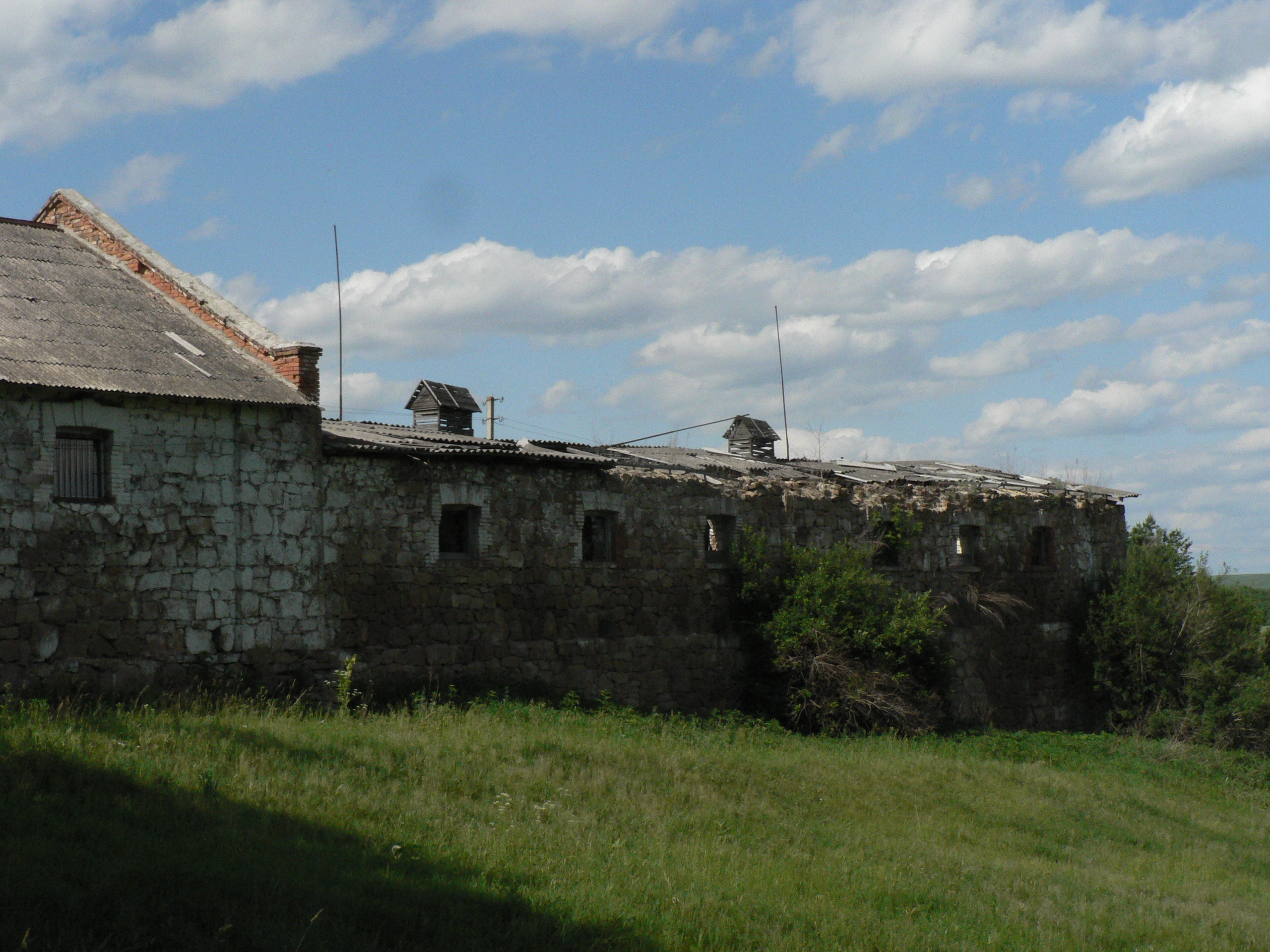 Конюшні пана Ярошинського в с. Дзвониха